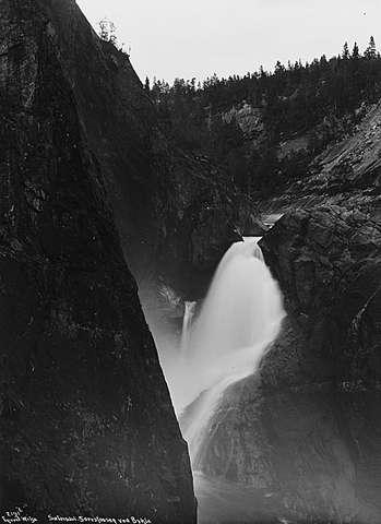 Sarvsfossen i Bykle kommune